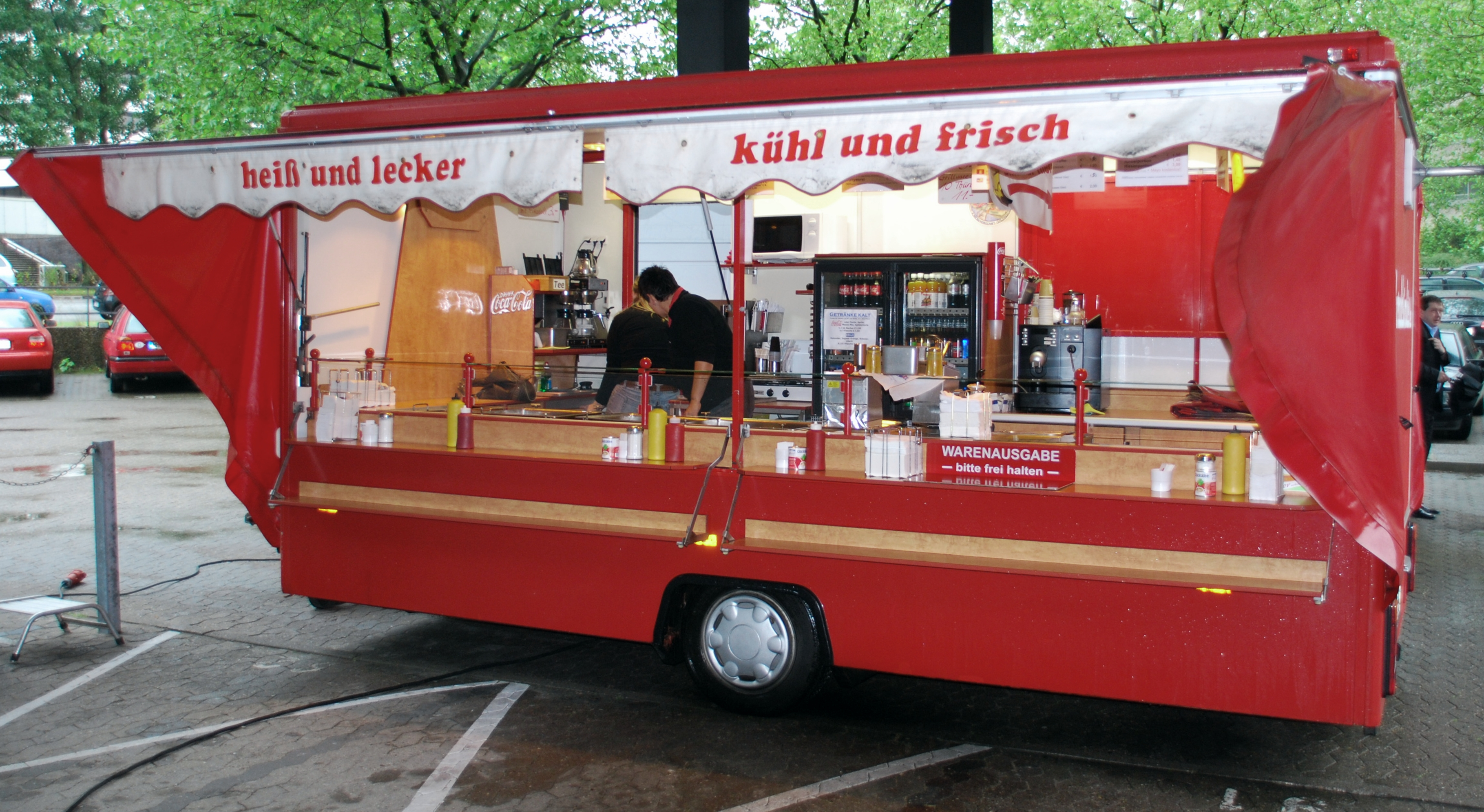 Imbissstand in Hamburg